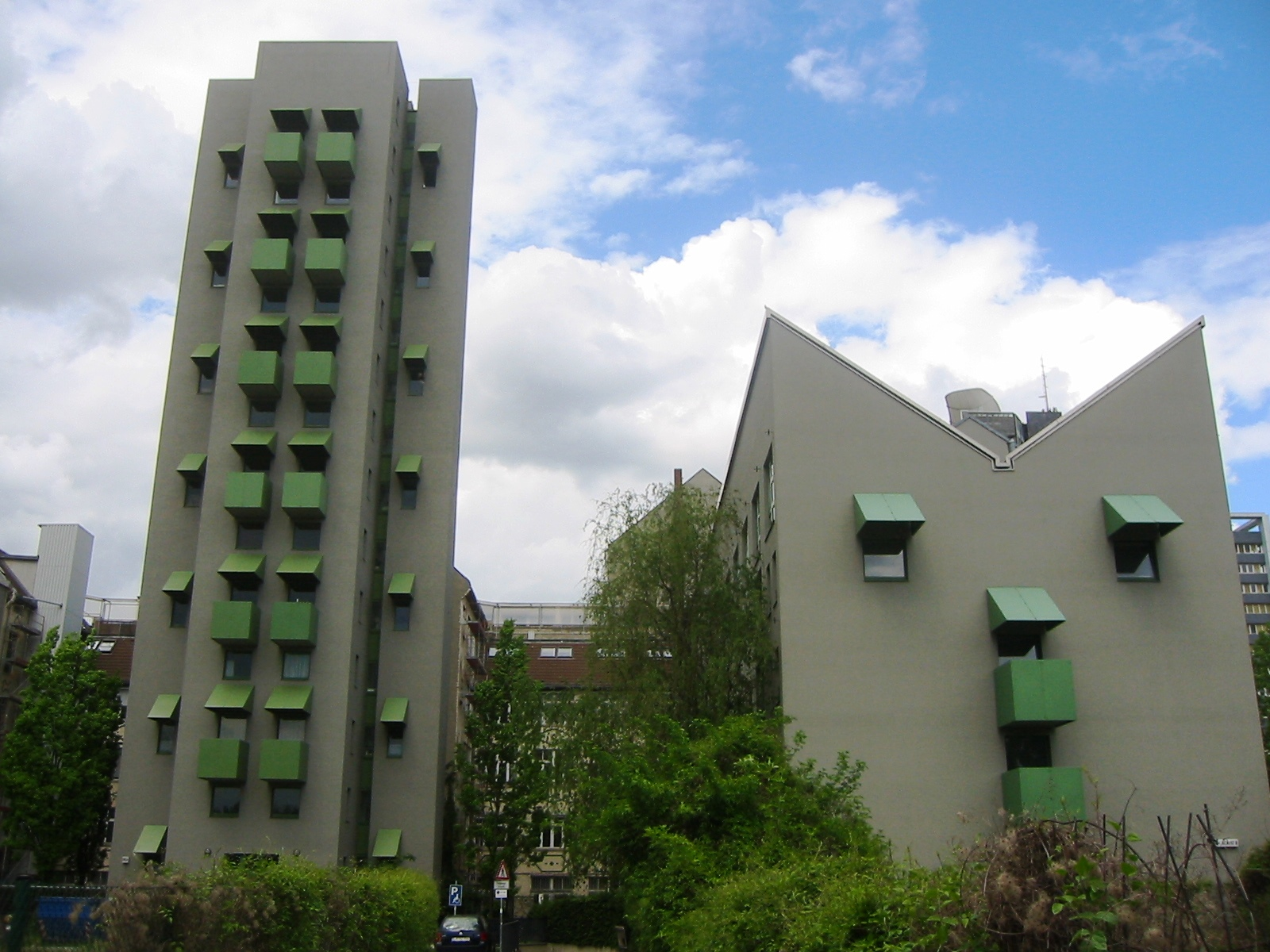 Kreuzberg Tower mit Flügelbau, entstanden zur Internationalen Bauausstellung 1984 von John Hejduk ("New York Five").